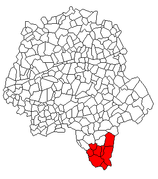 Localisation du canton de Preuilly sur Claise en Indre et Lire